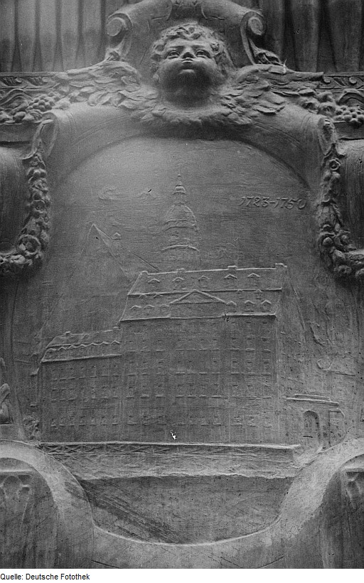 Original image description from the Deutsche FotothekSockelrelief des Bachdenkmals